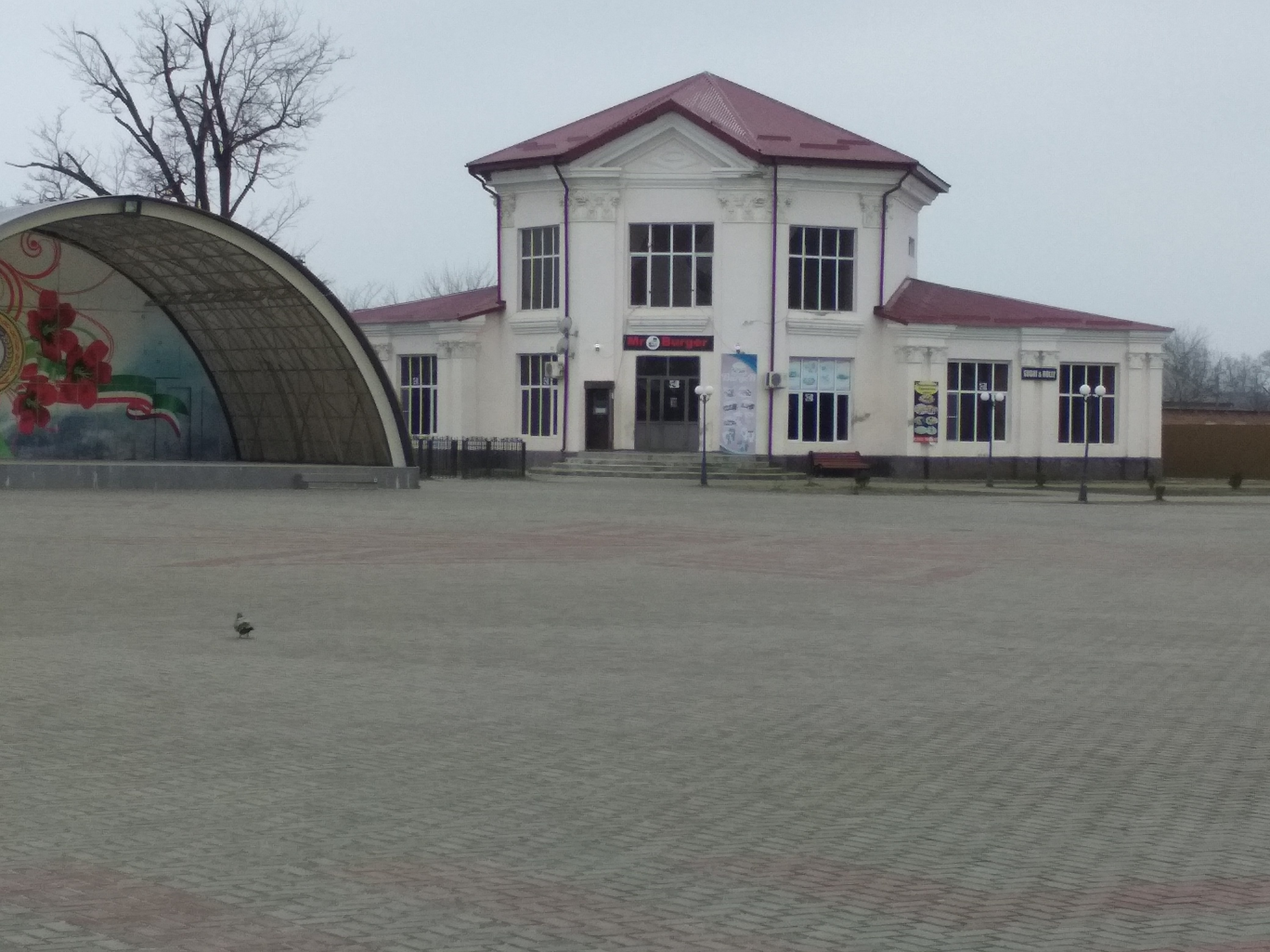 Нохчийн: Здание бывшей библиотеки